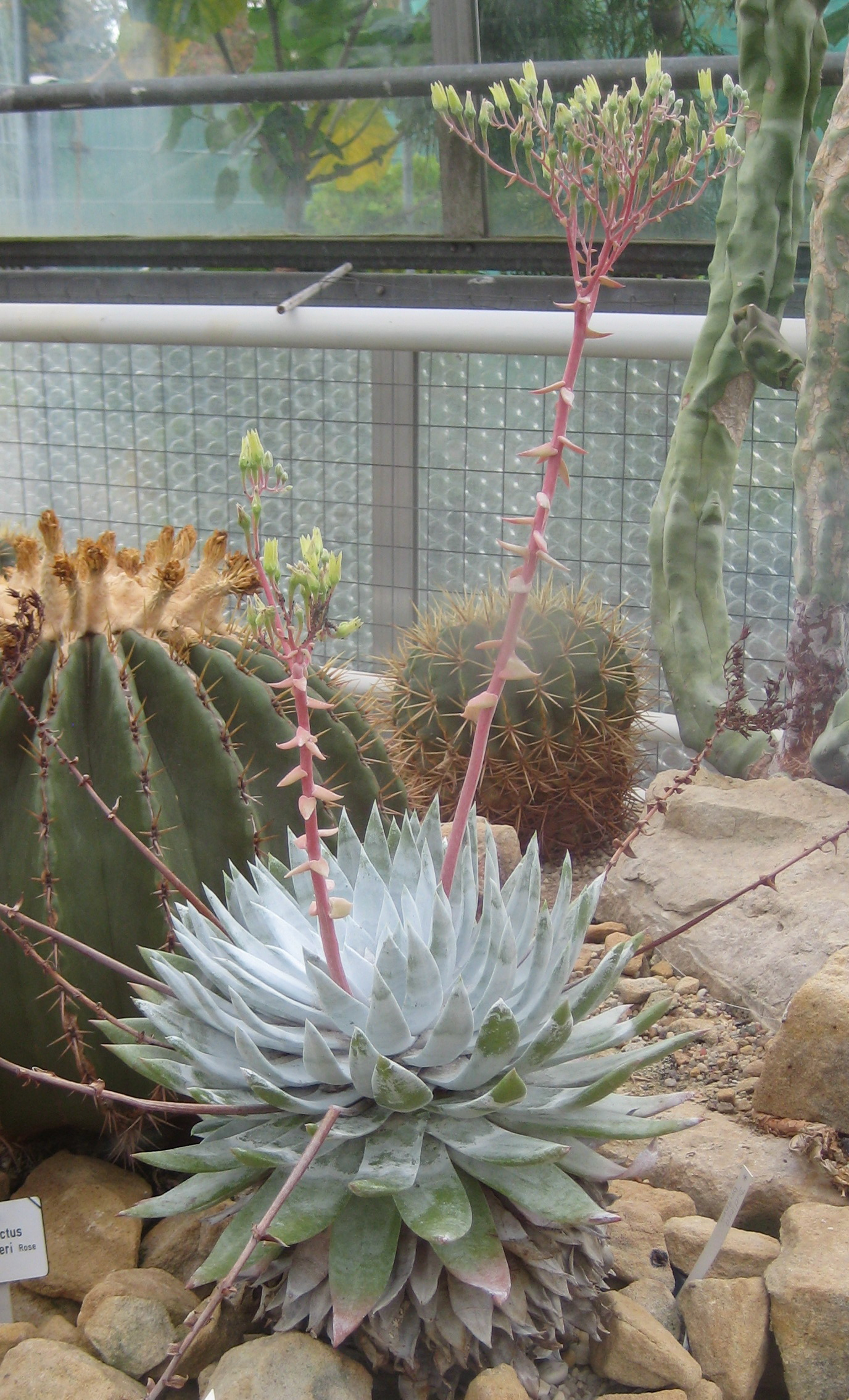 Dudleya brittonii im Botanischen Garten Dresden